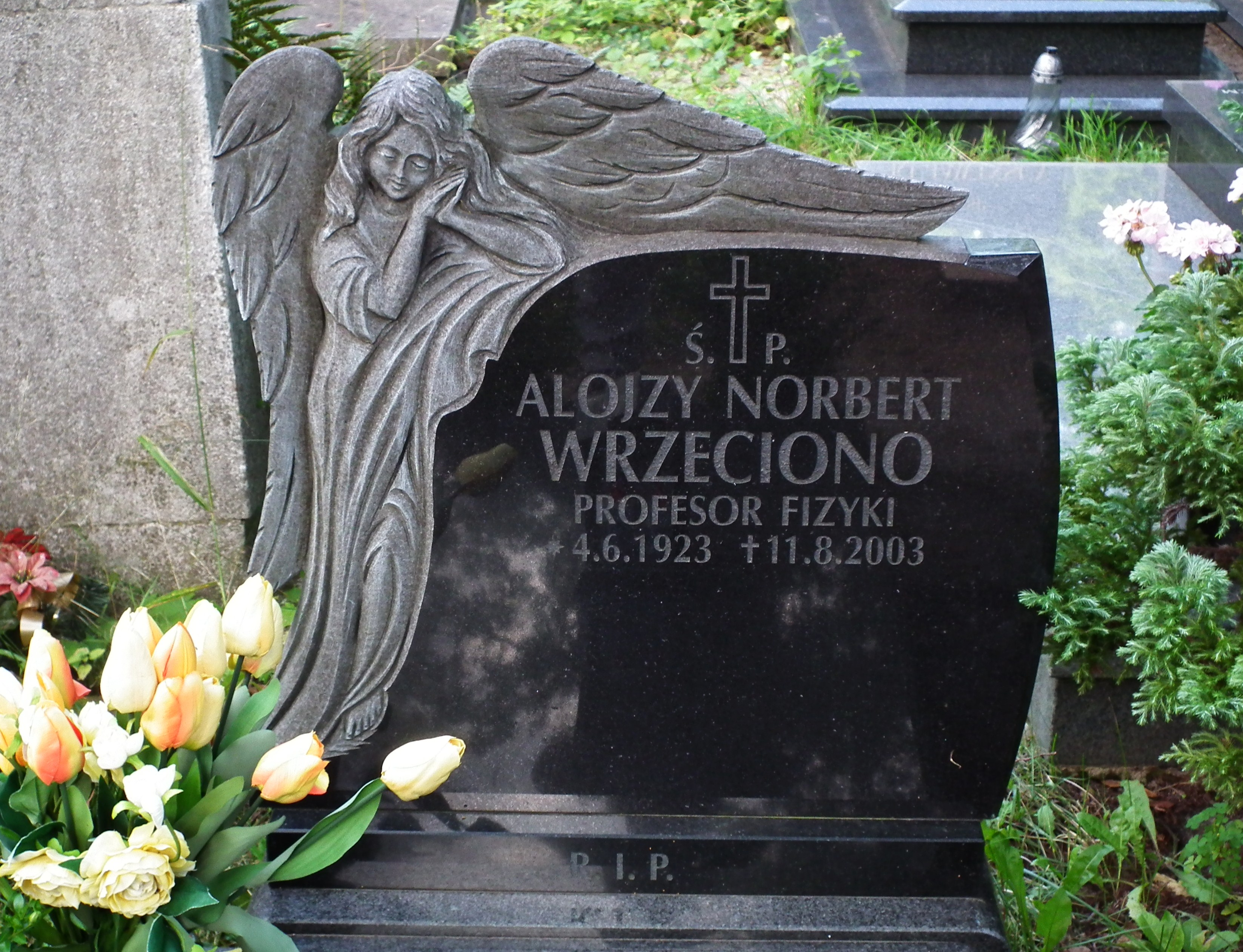 Grób prof. Wrzeciono na Cm. Jeżyckim w Poznaniu.